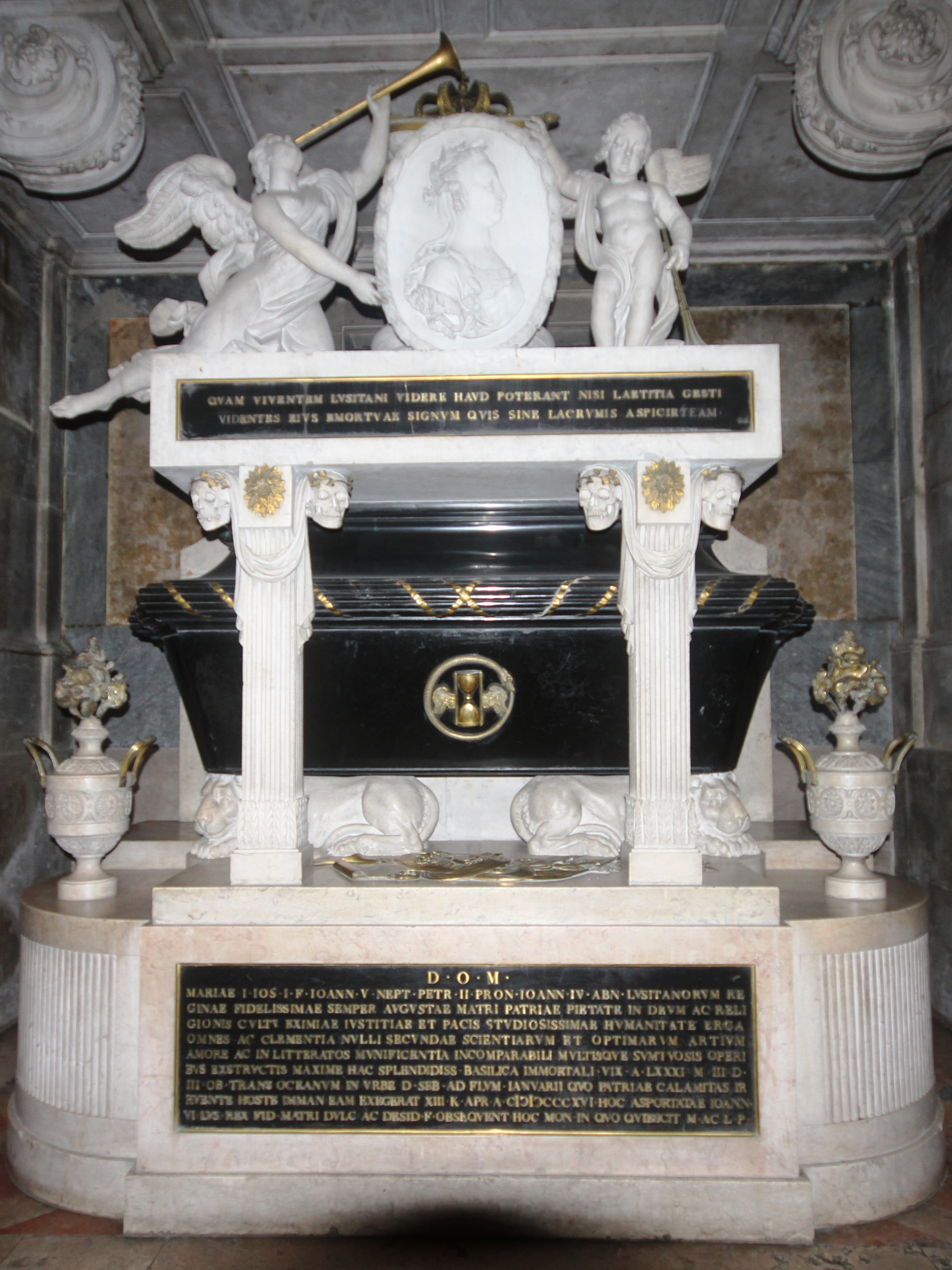 Túmulo de Maria I